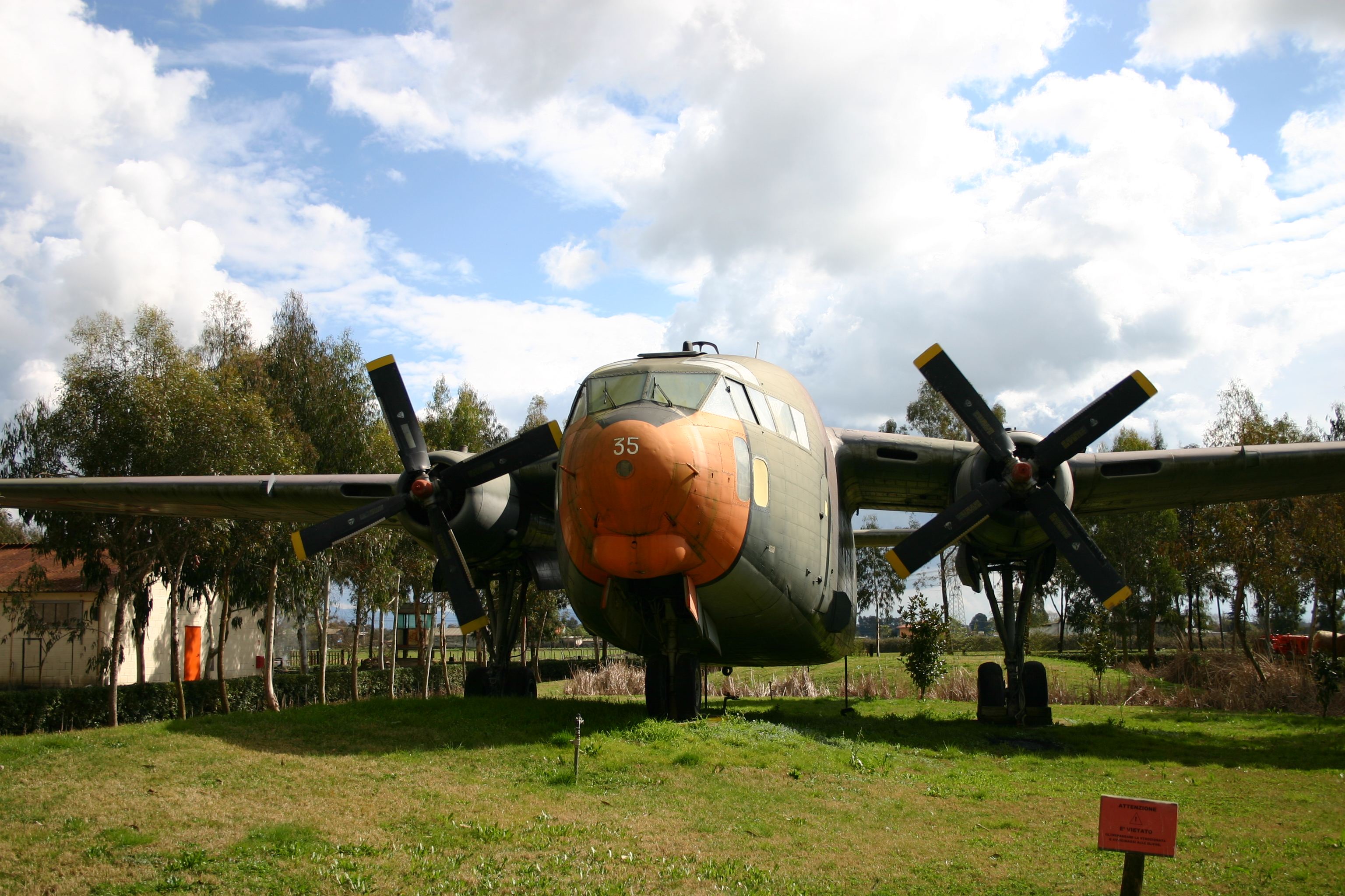 B.go san michele museo piana delle orme